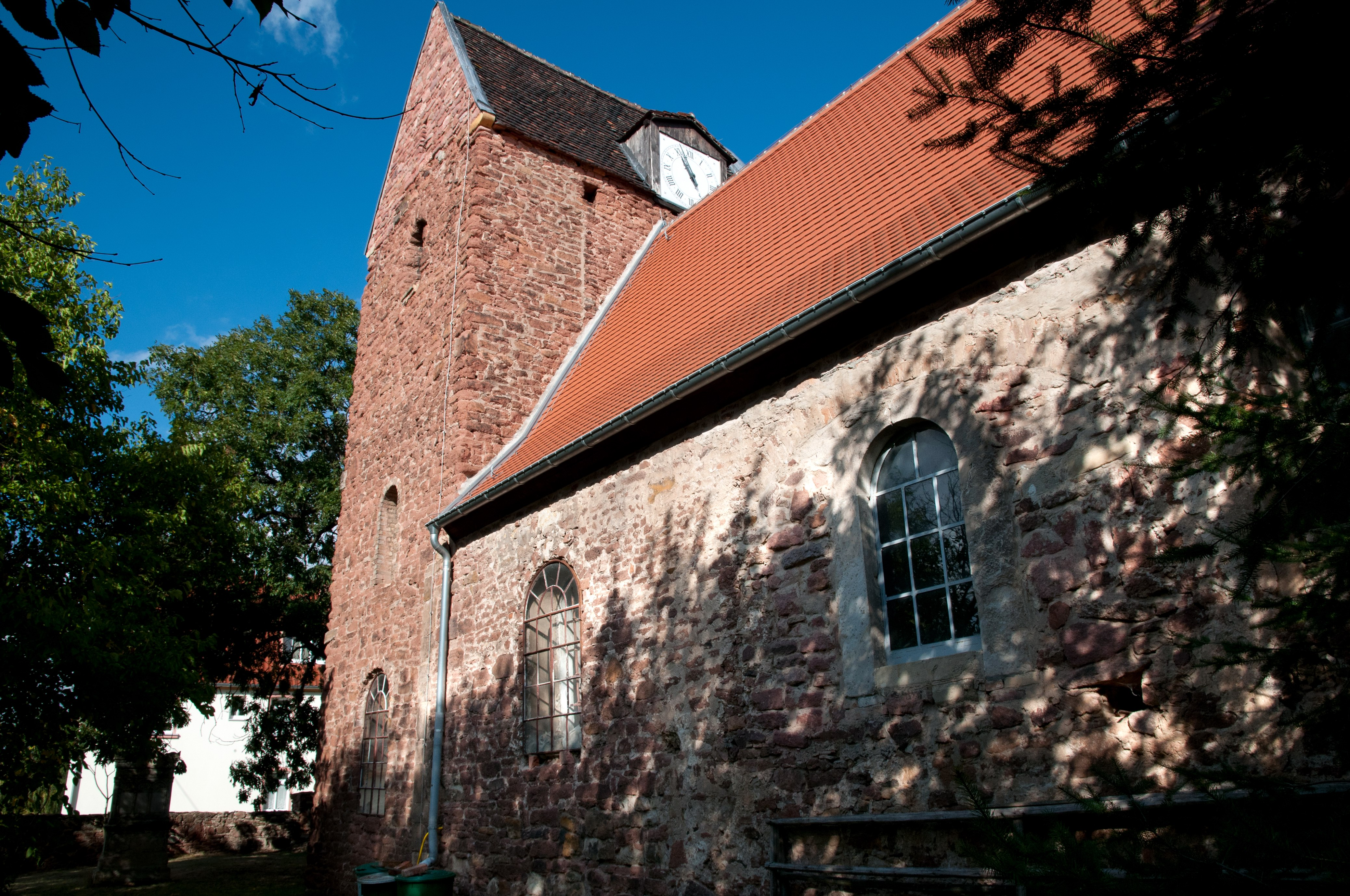 Döblitz Kirche (Sachsen Anhalt, Deutschland)